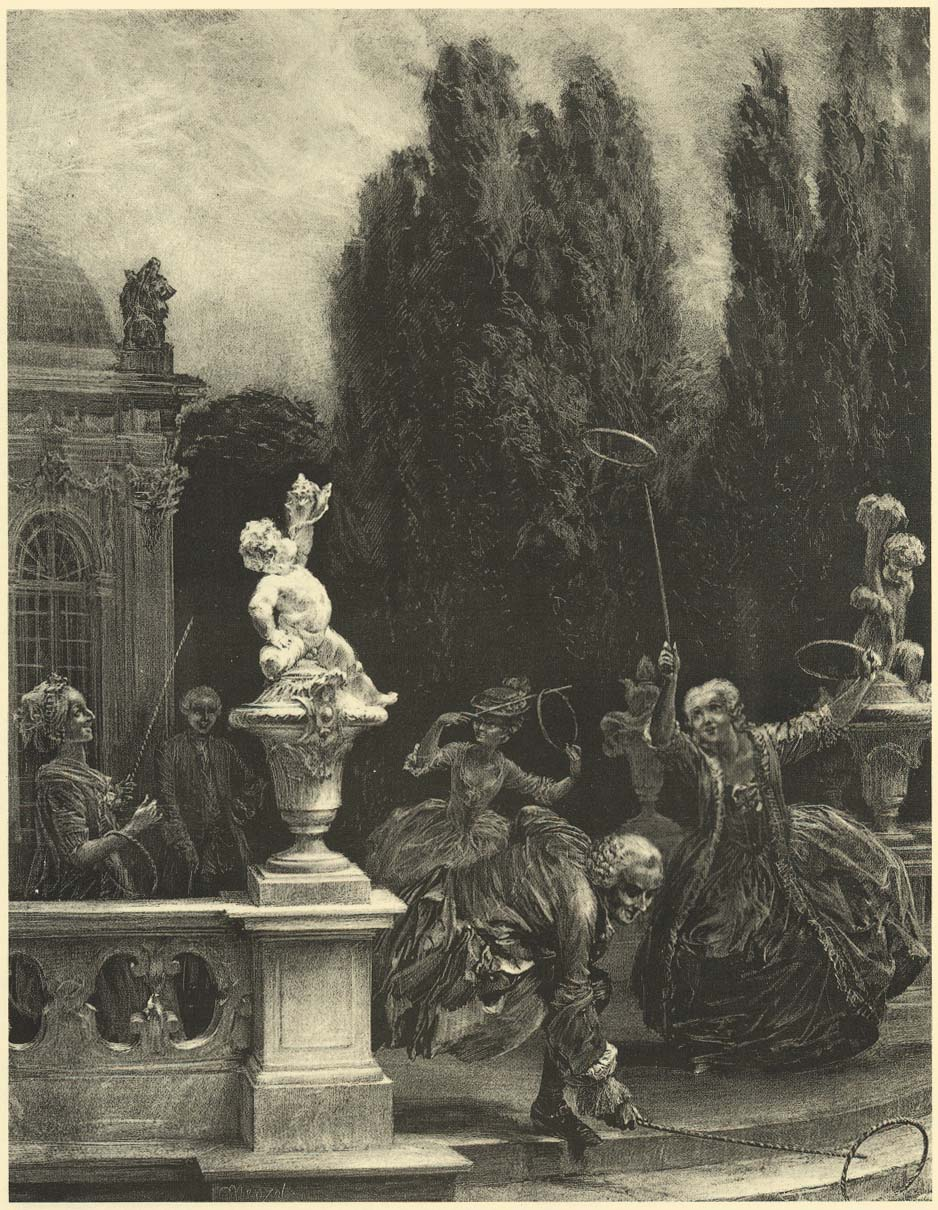 Reifenspiel auf der Schlossterrasse, Lithografie in Schabtechnik, 1851